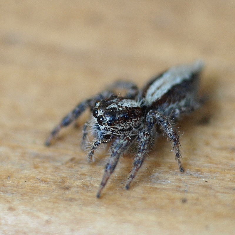 Pancorius crassipes